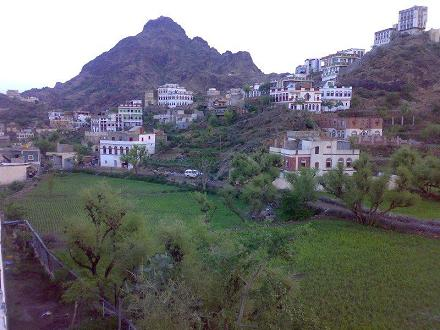 صورة جانبية لمنطقة السواغ(سواغ الجبل)ونلاحظ جبل مؤيمرة الشامخ وهو يطل عليها ويحتضن قرية االحقيل التي بجانبها